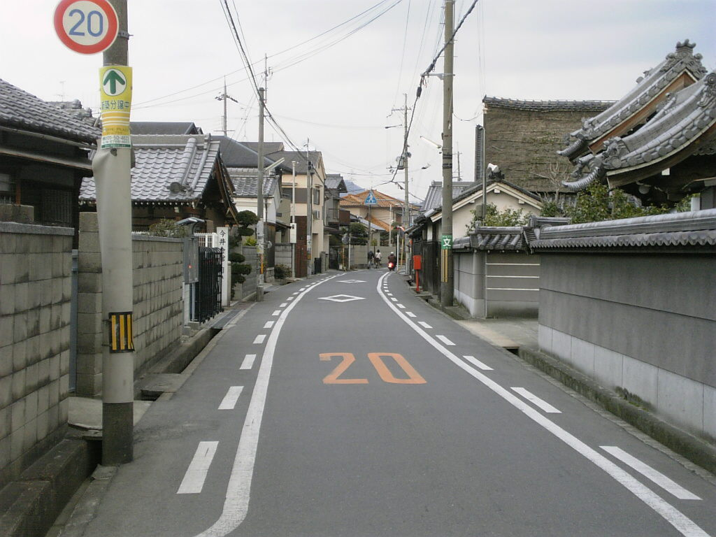 八尾街道（大阪府八尾市南本町）